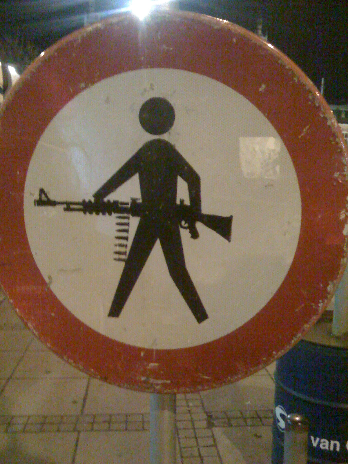 Street art in Amsterdam (stationsplein)